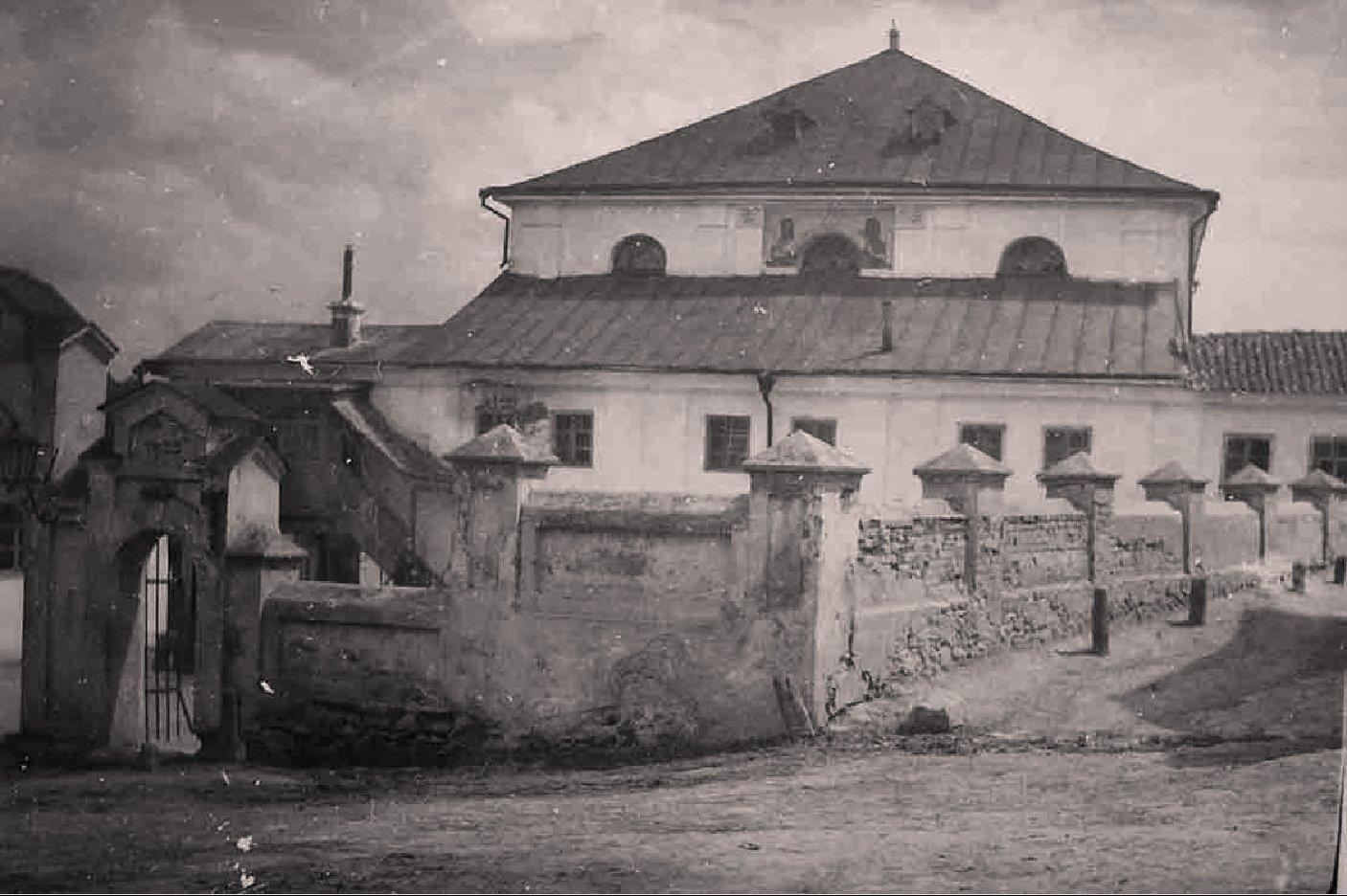 Синагога в Вишневце